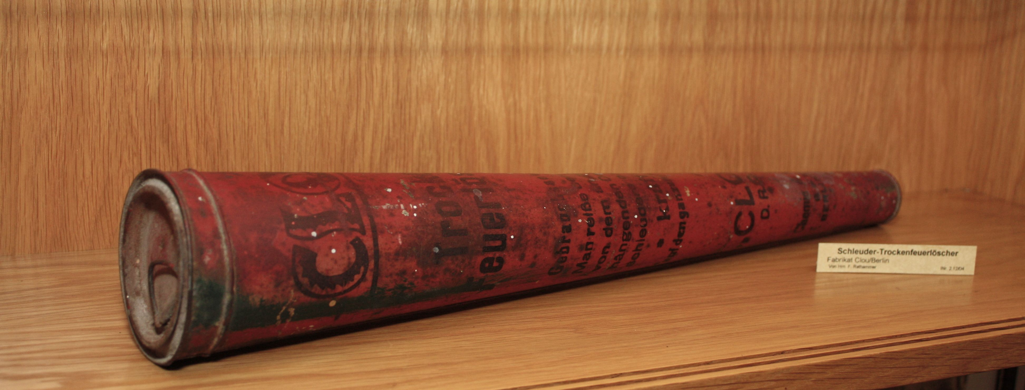 Schleuder-Trockenfeuerlöscher aus dem Jahr 1900 der Fa. Clou-Berlin im Feuerwehrmuseum Perchtoldsdorf, Niederösterreich